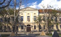 City hall in Jászberény - Városháza